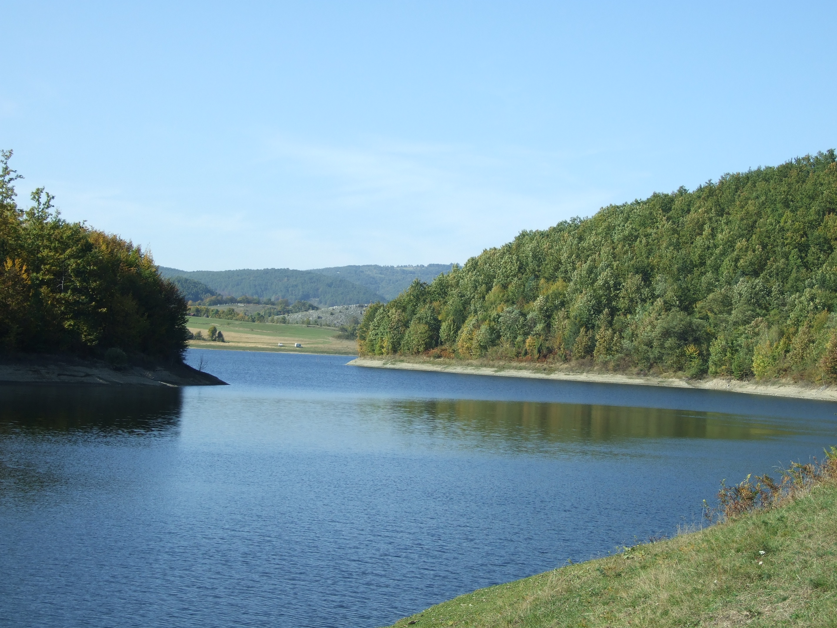 Možda zlatna ribica stvarno postoji